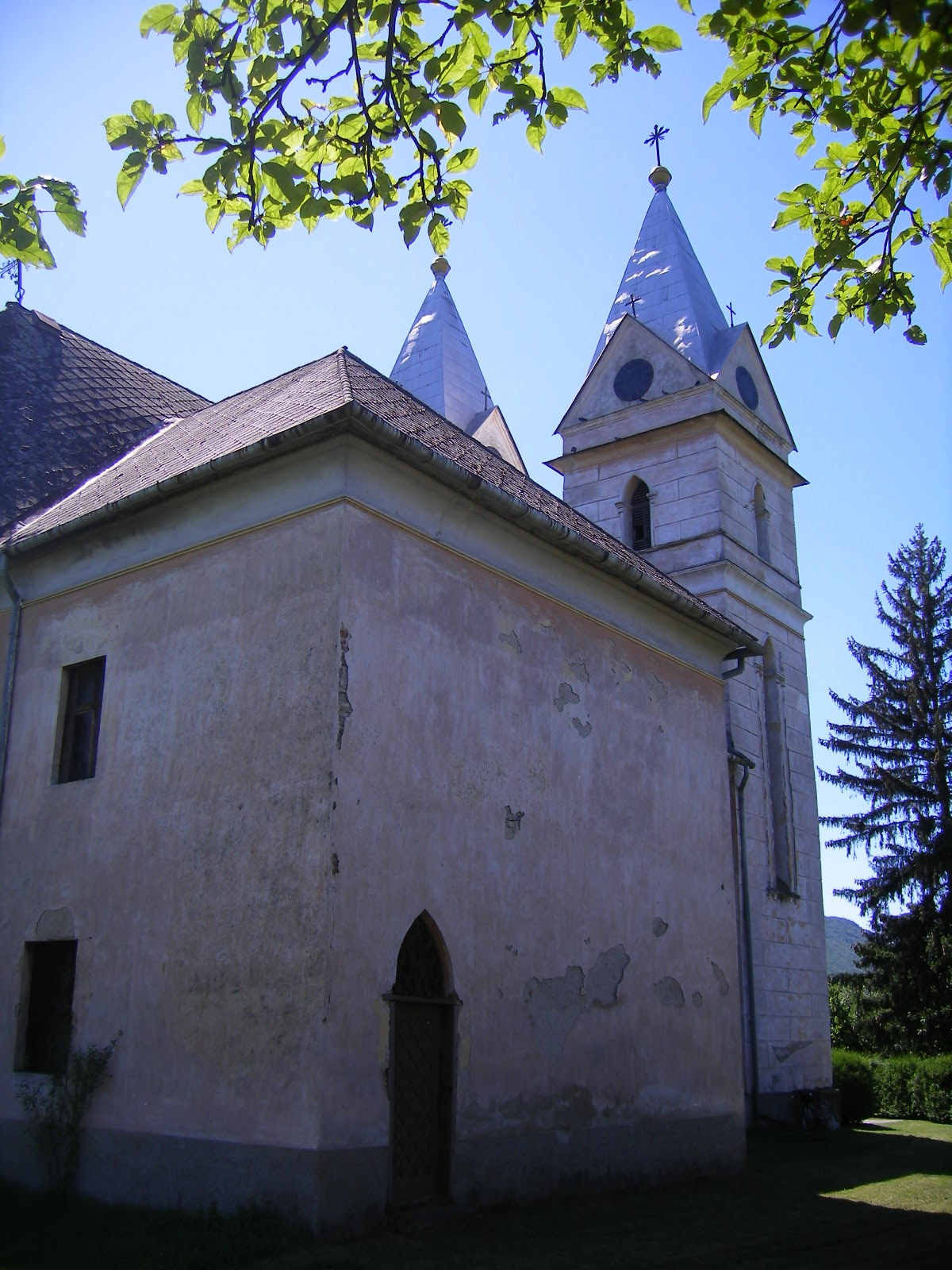 Várhosszúrét - Szent György-templom